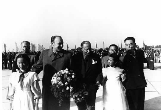 1957年9月27日，首都机场，周恩来总理拉着江青（右二）向匈牙利总理卡达尔献花。